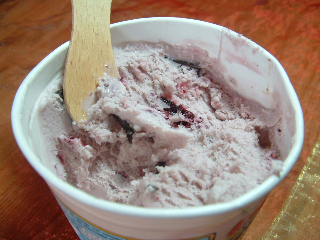 Ben & Jerrys Cherry Garcia